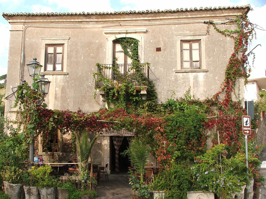 Descrizione - Savoca (provincia di Messina) - Bar Vitelli, luogo dove furono girate alcune scene del film "Il Padrino" parte I^ Autore - Pappalardo Rosario Fonte - Scattata il 08:11//2007)